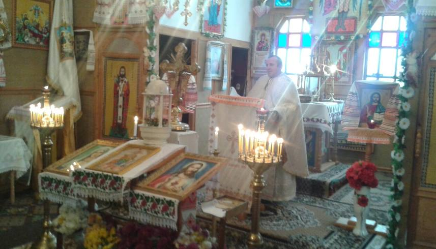 парох Середнього і Старого Угриновів, о.Ярослав Мельничук /УГКЦ/